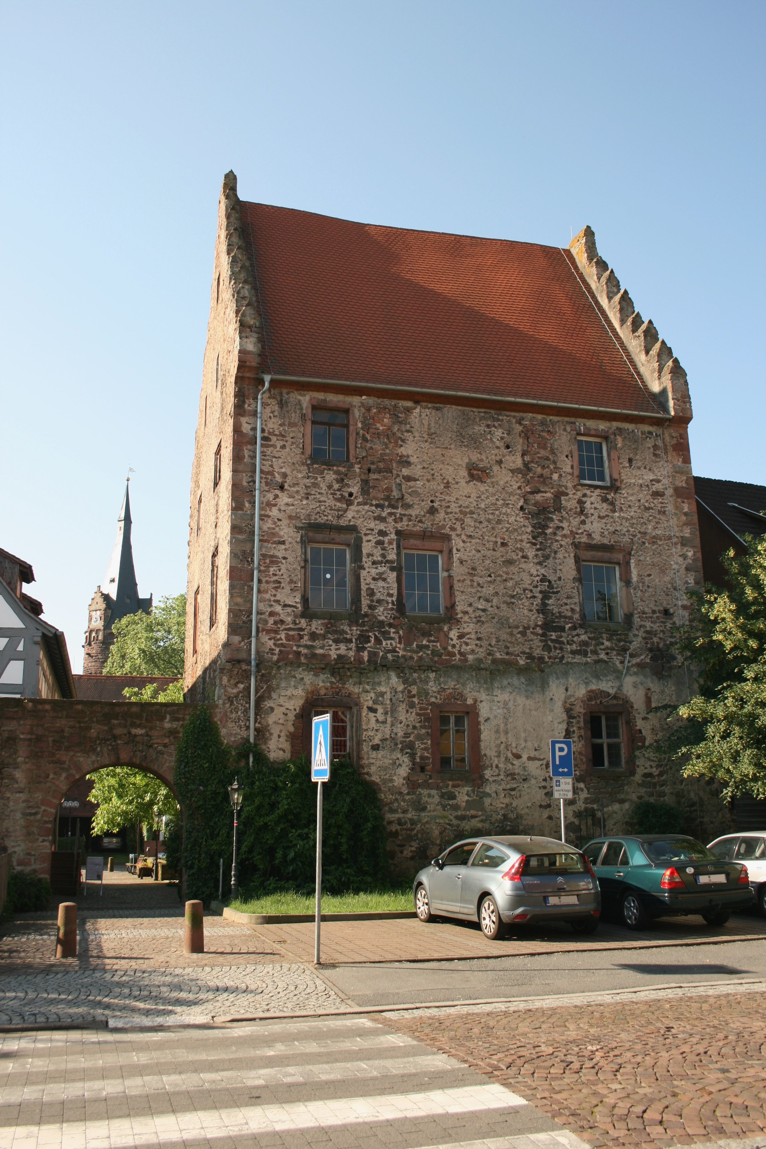 Sogenanntes Templerhaus in Erbach. Burgmannenhaus der Familie Echter aus dem 14. Jahrhundert (Städtel 15a/21).